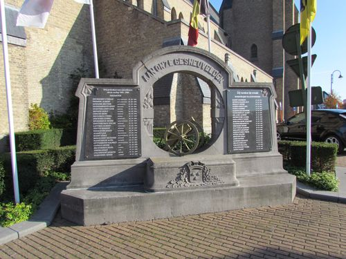 oorlogsmonument